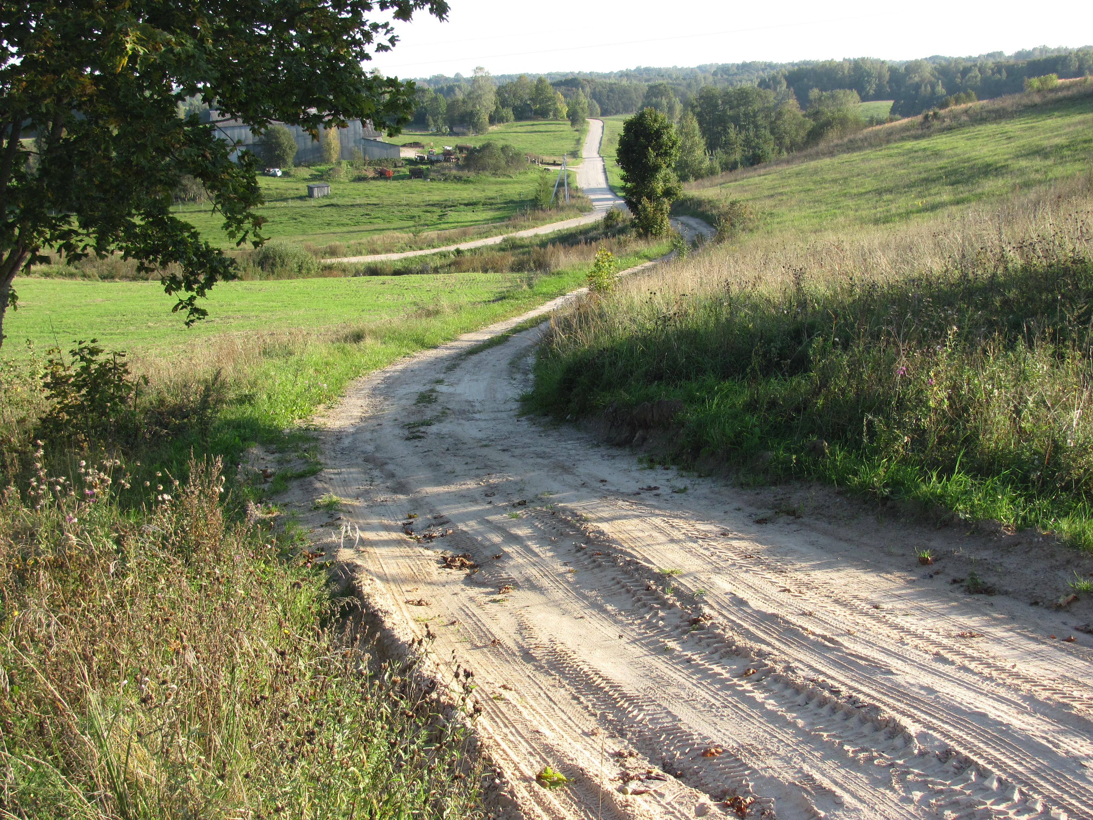 Utenos sen., Lithuania